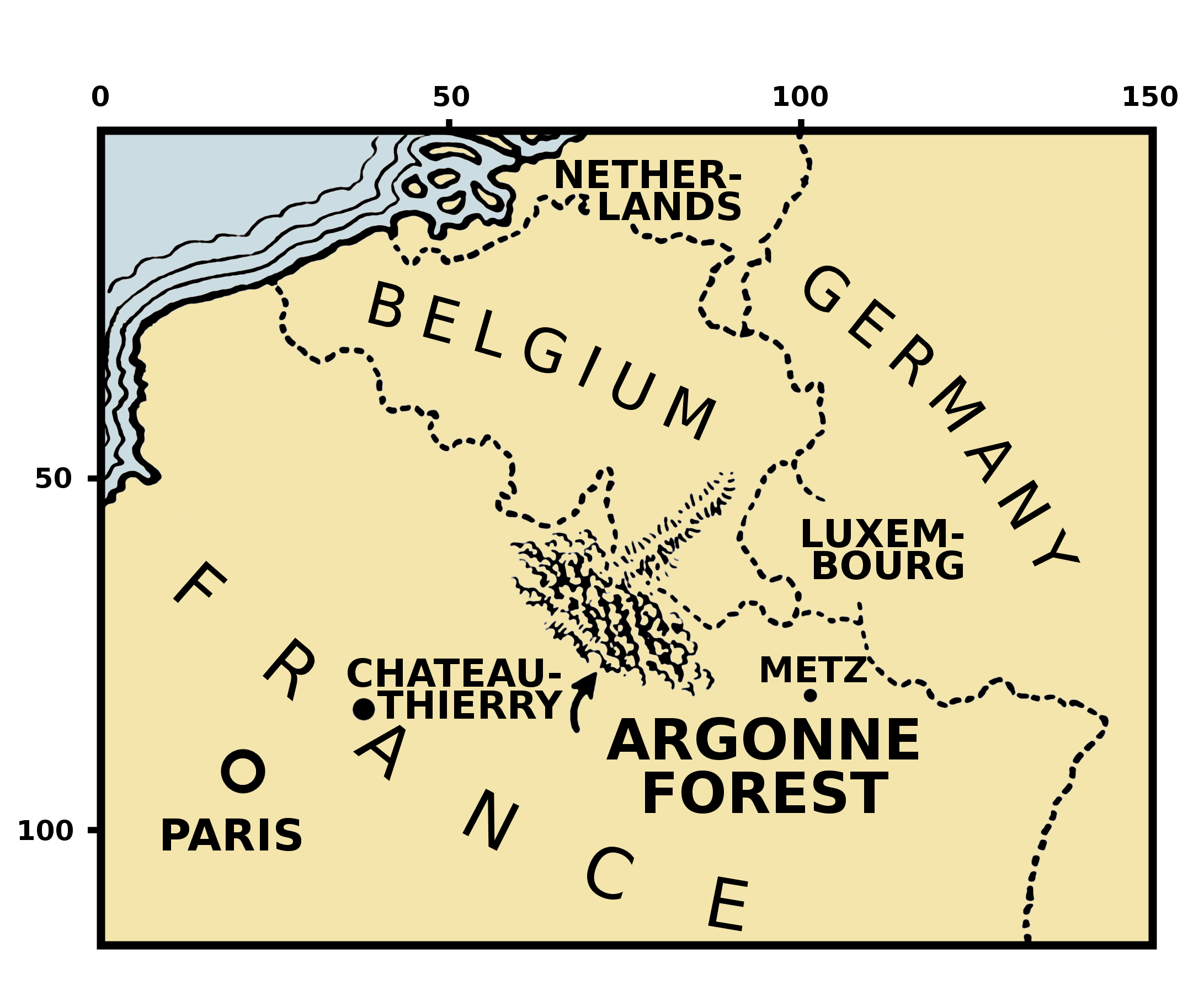 Argonne Forest